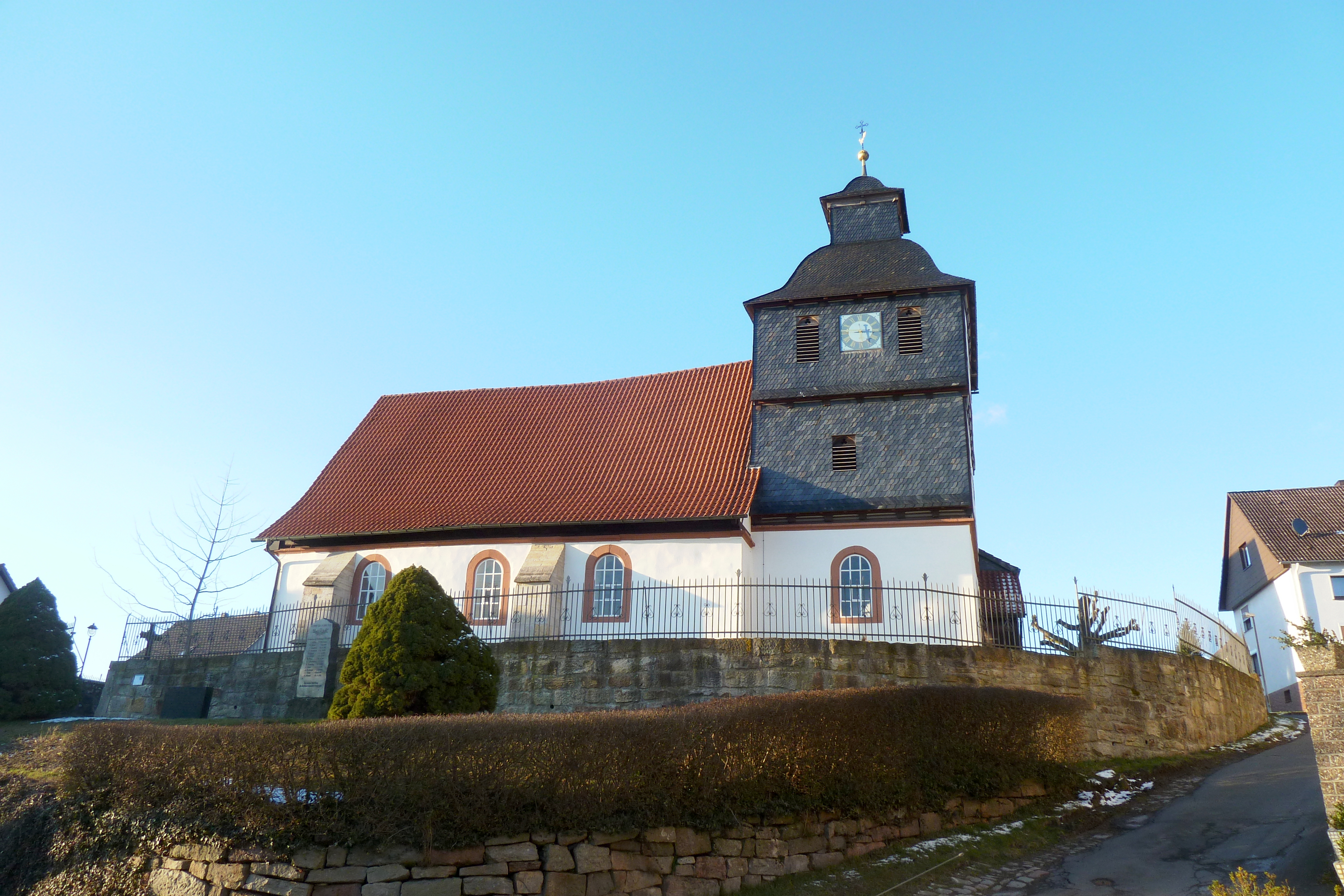 Ev.-luth. Kirche in Escherode, Gemeinde Staufenberg, Südniedersachsen. 1425 erstmals urkundlich erwähnt, Untergeschoss des Chortums mit Rippengewölbe vermutlich 15. Jh. mit Wandmalereifragmenten des 14./15. Jahrhunderts lt. Denkmaltopographie. Tumobergeschosse jünger aus Fachwerk, teils verschiefert. Fenster- und Türöffnungen mit Werksteineinfassungen ebenfalls jünger, Nordportal dat. 1720